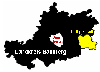 Heiligenstadt (Oberfranken) im Landkreis Bamberg